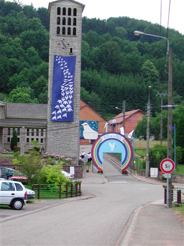 église de Reyersviller